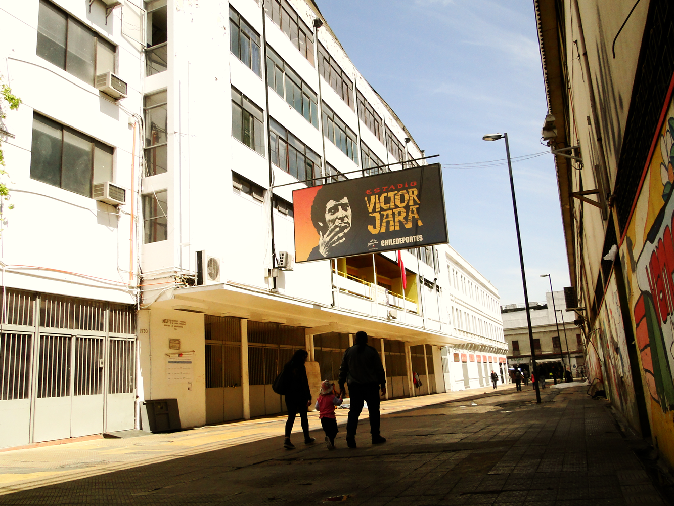 Estadio Víctor Jara This is a photo of a national monument in Chile: 2141